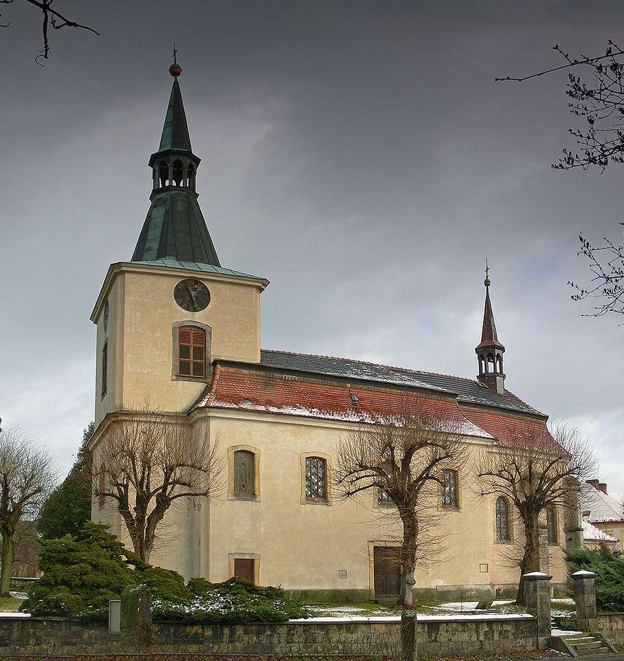 Kostel Libuň